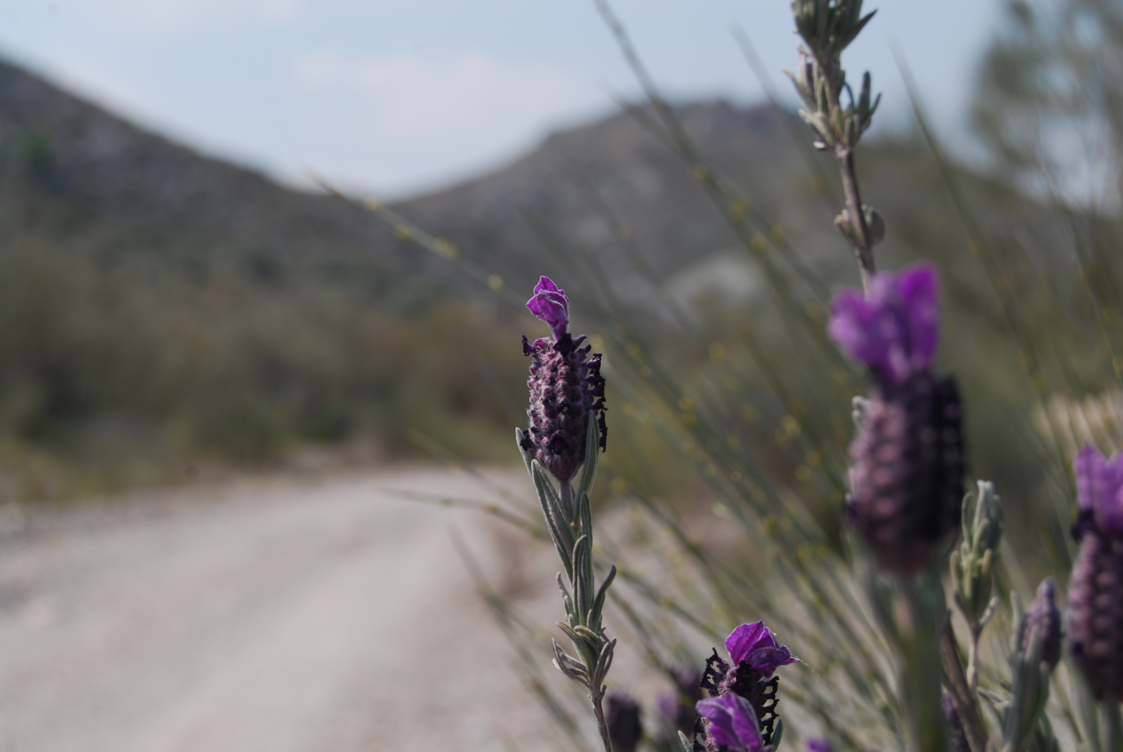 Detalle de una flor en la Rambla de Béjar